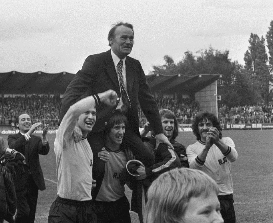 Roda JC tegen Ajax 0-0, Rodaspelers met trainer Fritz Pliska op de schouders